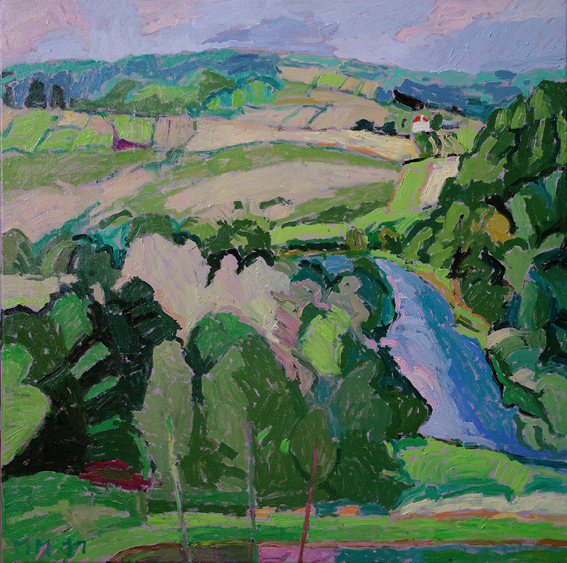 Pejzaż z Chołowic, Marek Mikrut, 2011 r.